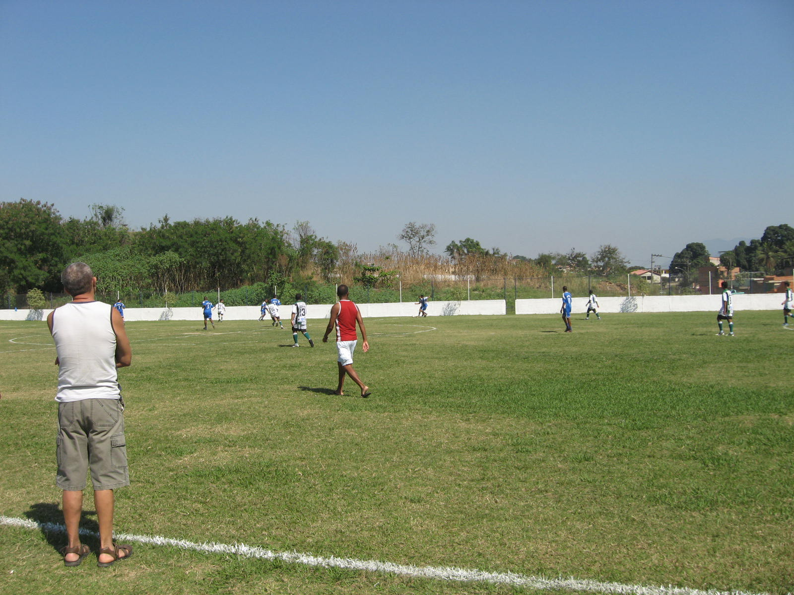 Centro Esportivo Antonio Mossoró, o estádio do Novo Brasil FC.